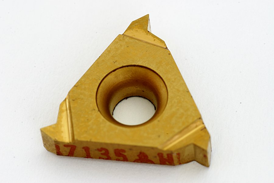 Wendeschneidplatte zum Gewindedrehen